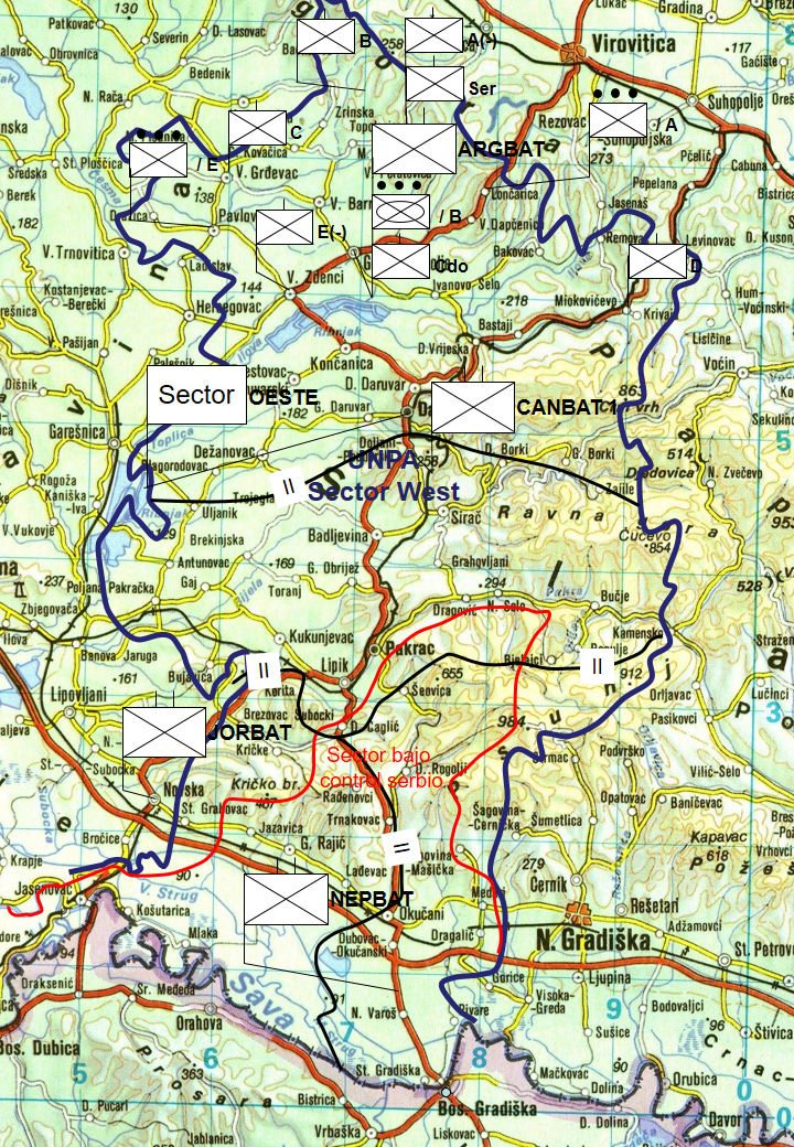 Confeccionado sobre la base de: Servicio Histórico del Ejército. El Ejército Argentino y las Operaciones de Mantenimiento de la Paz. UNPROFOR. Volumen V. Pag 52 y ss.